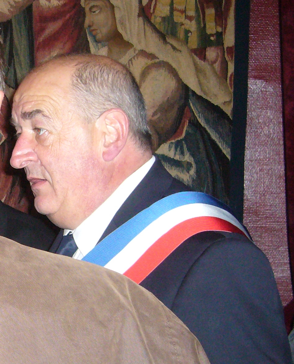 Alain Bertrand le jour de son élection par le conseil municipal à la mairie de Mende, Lozère